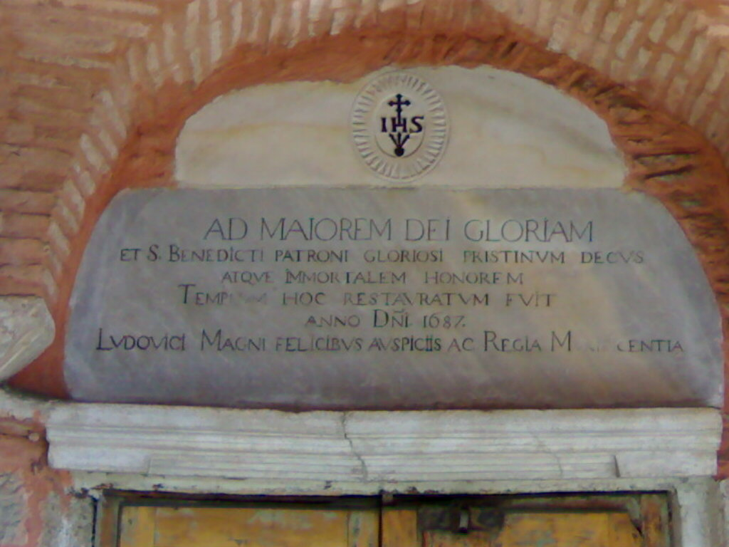 L'inscription sur la porte de l'église Saint-Benoît à Galata, Istanbul